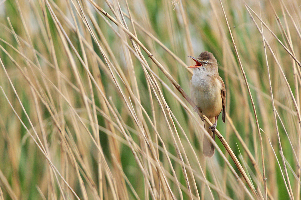 Drosselrohrsänger im Ilkerbruch